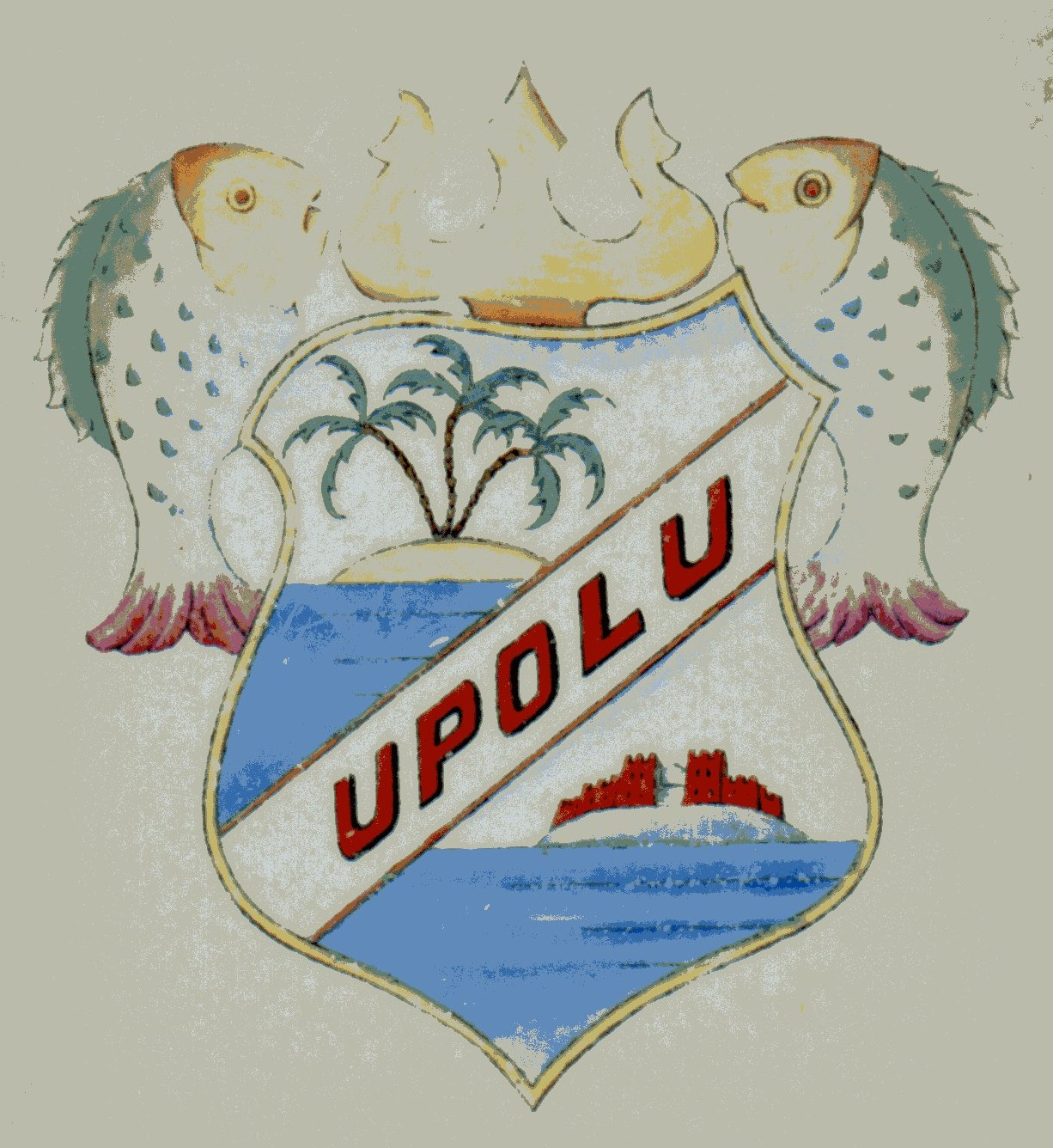 Wappen der Marineflakabteilung 244 Brinkamahof II. Das Wappen bezieht sich auf den früheren deutschen Kolonialbesitz Upolu.